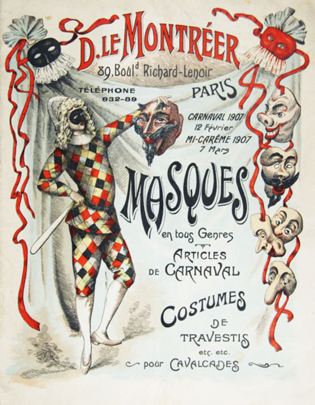 Couverture d'un catalogue d'articles de Carnaval édité par un commerçant parisien en 1907 (33 pages, illustrées).